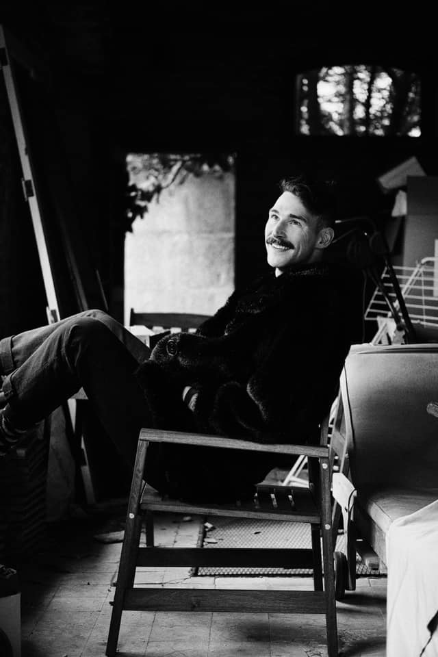 foto door Andrew Snowball, 2020